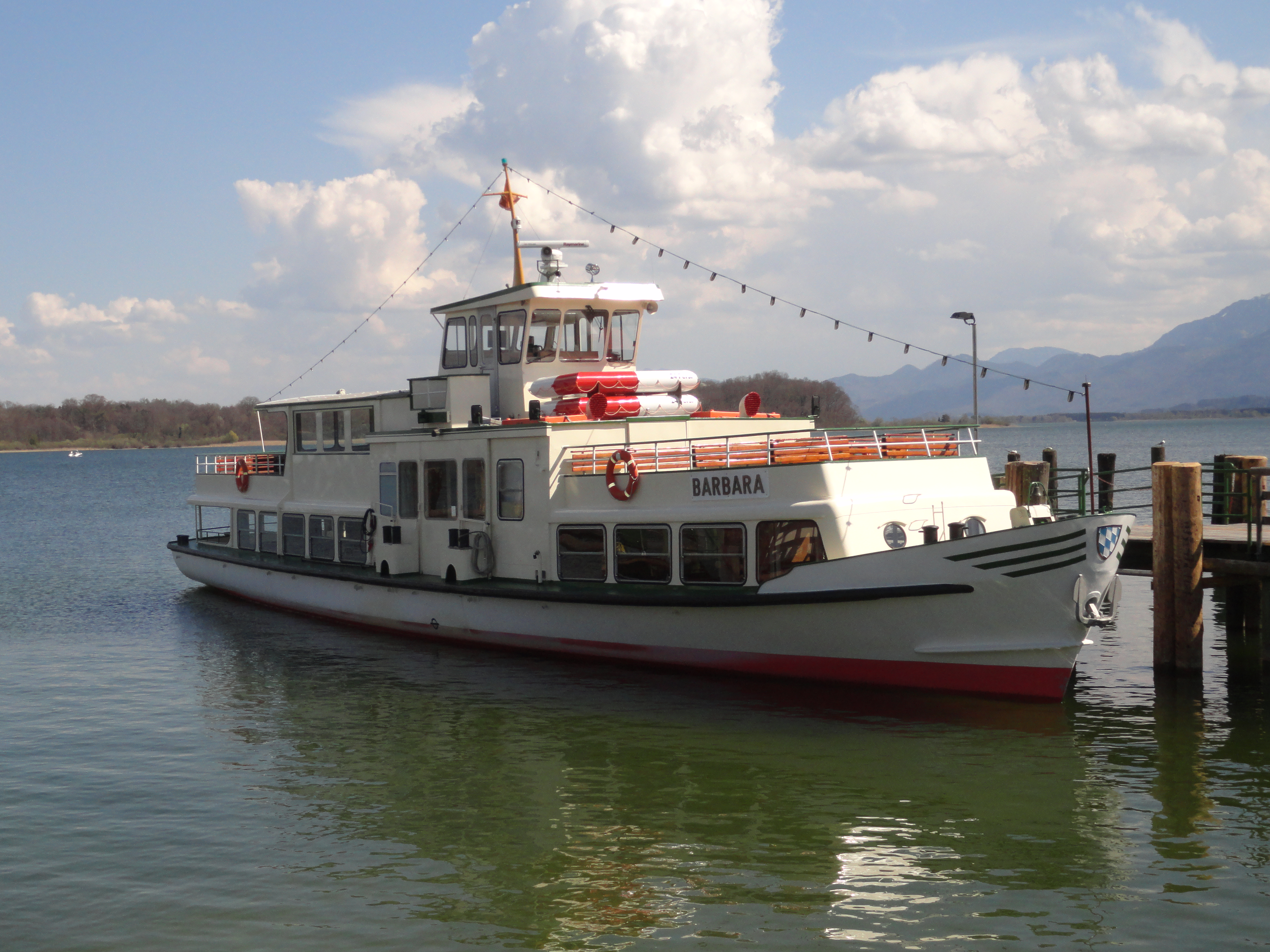 Das Fahrgastschiff Barbara an einem Steg der Anlegestelle in Prien am Chiemsee